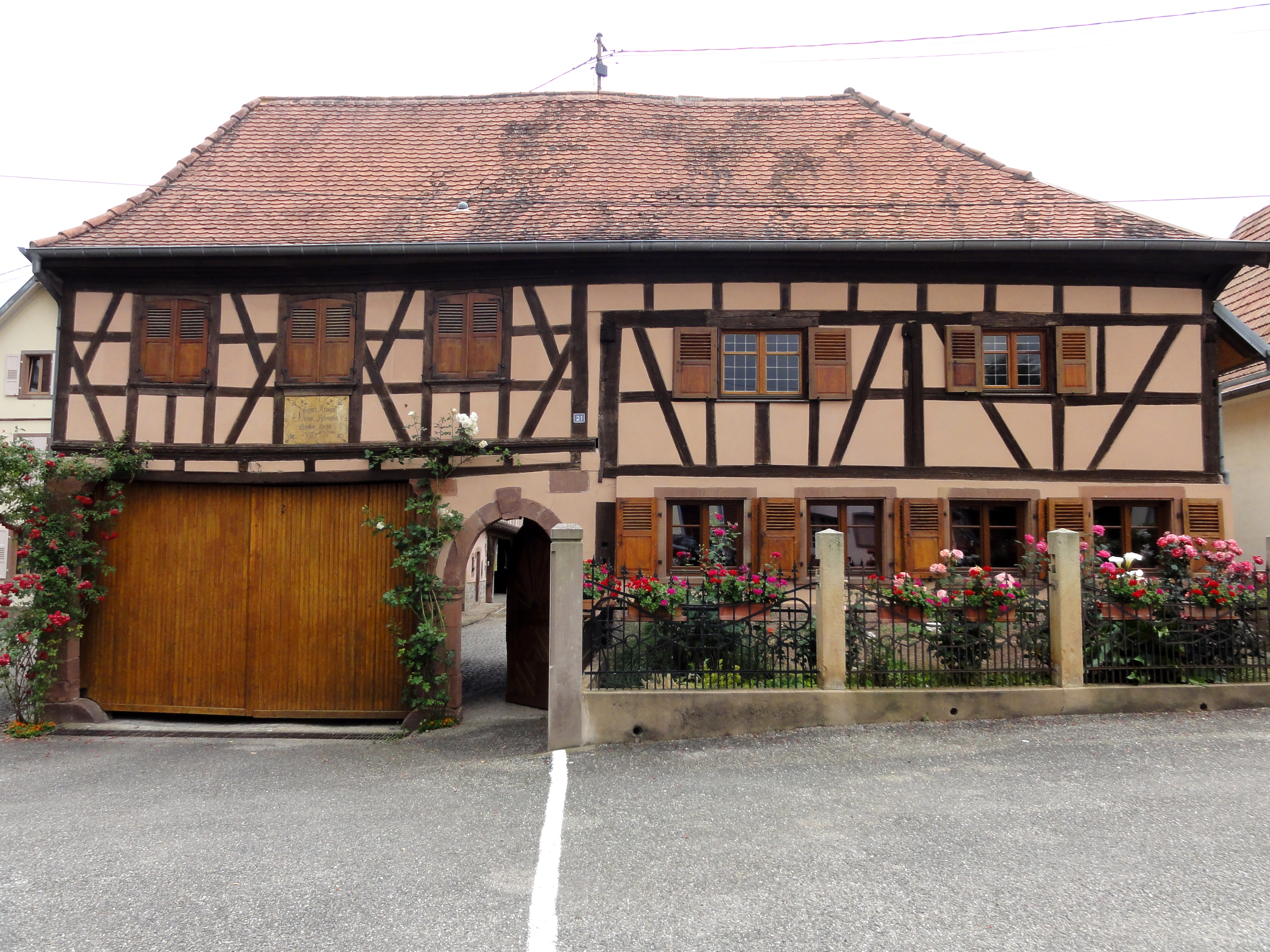 Alsace, Bas-Rhin, Mittelhausen, Ferme (1723), 21 rue Principale. .